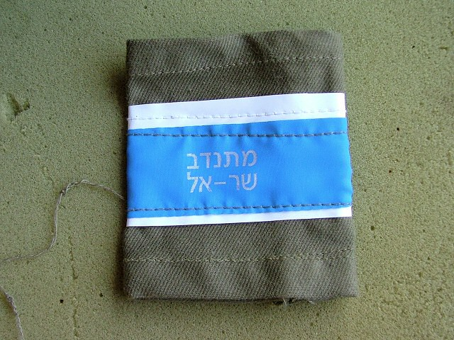 Sar-El Schulterstück (Neue Version mit Aufdruck Schrift: Mitnadev Sar-El Freiwilliger Sar-El)